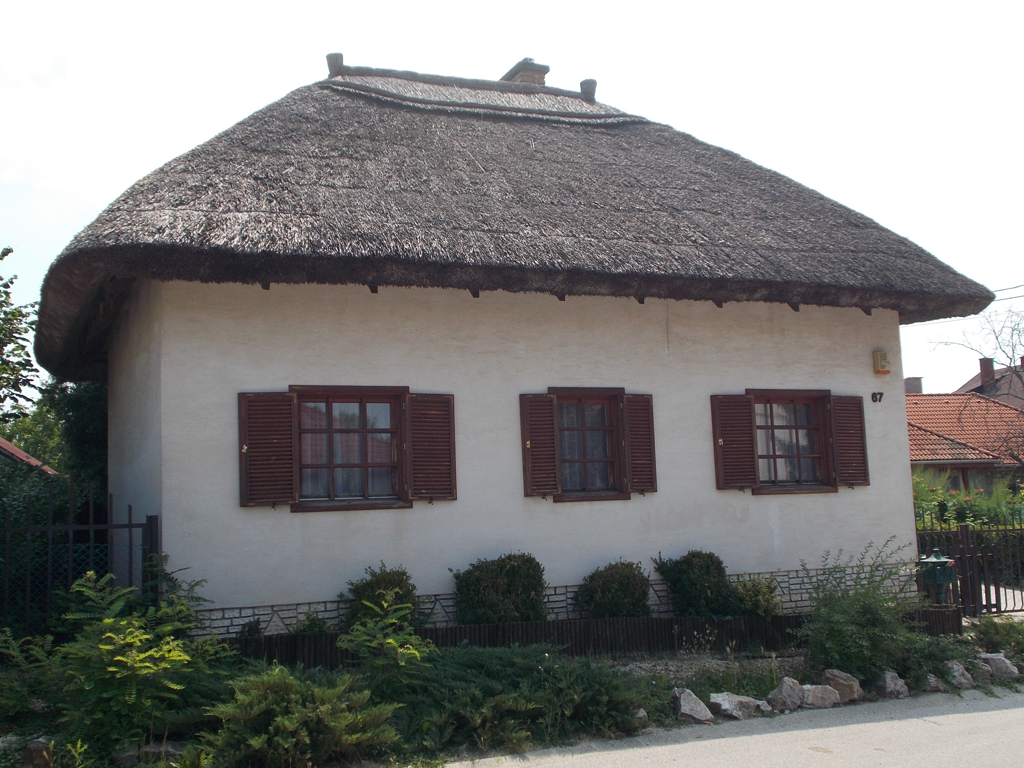 Egykori présház nádtetővel. Műemlék ID 730. - Magyarország, Fejér megye, Székesfehérvár, Öreghegy, Lomnici út 67. This is a photo of a monument in Hungary, Identifier: 730